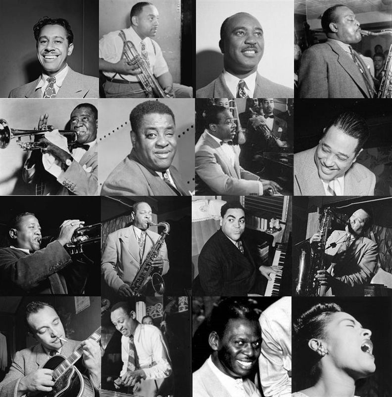 montage photo des grands maitres du jazz classique